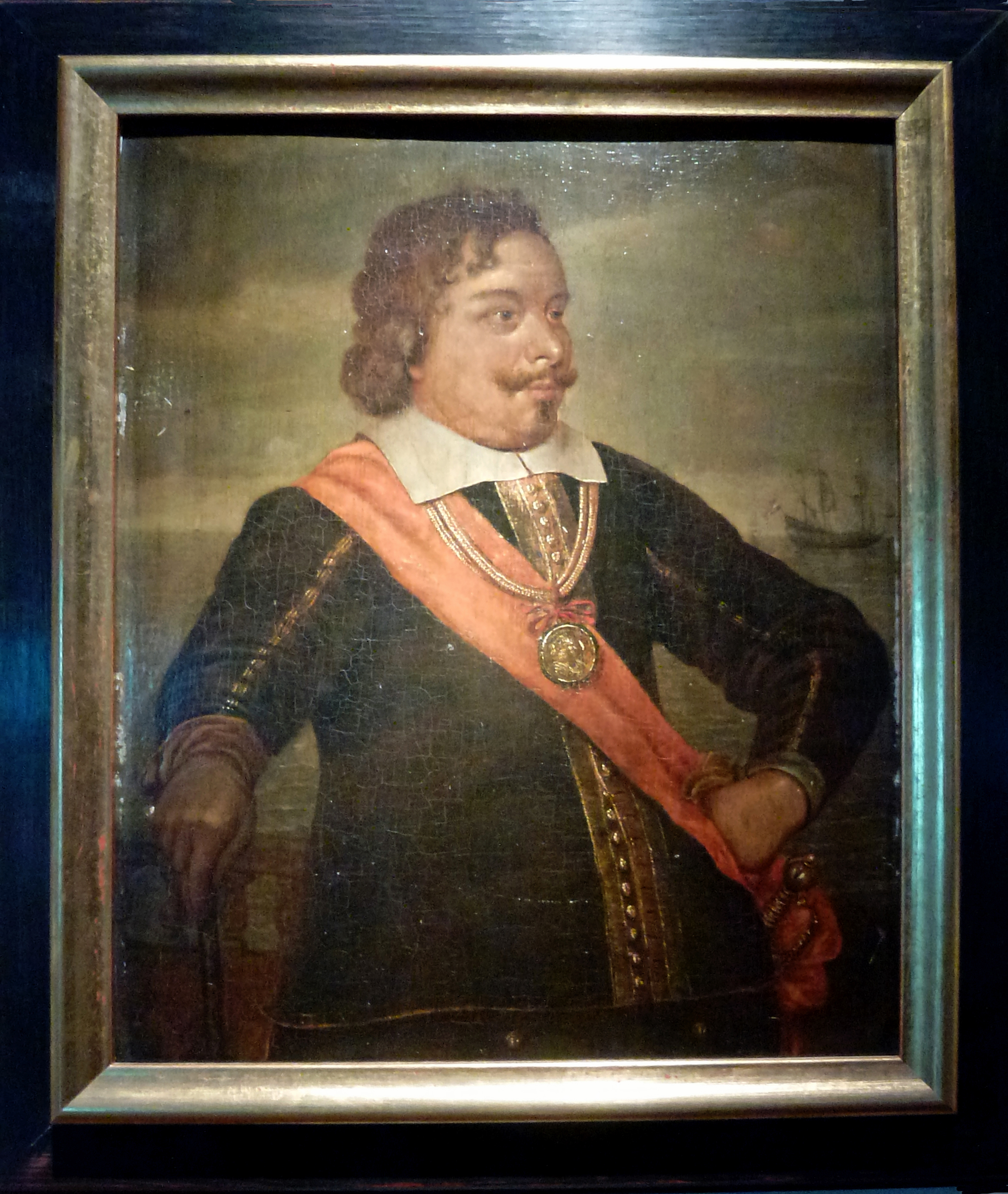 Portret van Egbert Meeuwsz Kortenaer of Egbert Bartolomeusz Kortenaer (1604-1656)